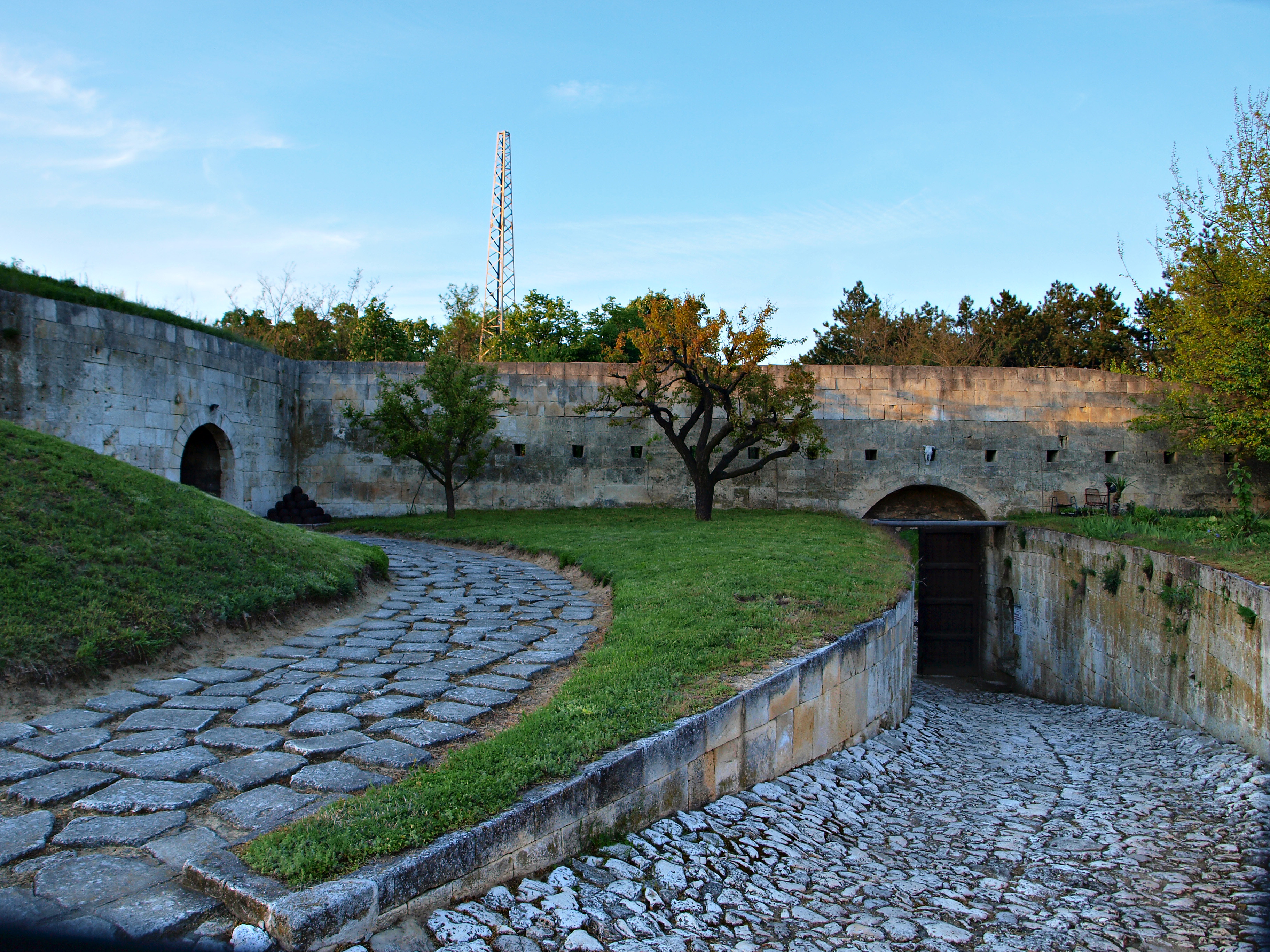 Medzhidi Tabia Ottoman fortress above Silistra, Bulgaria